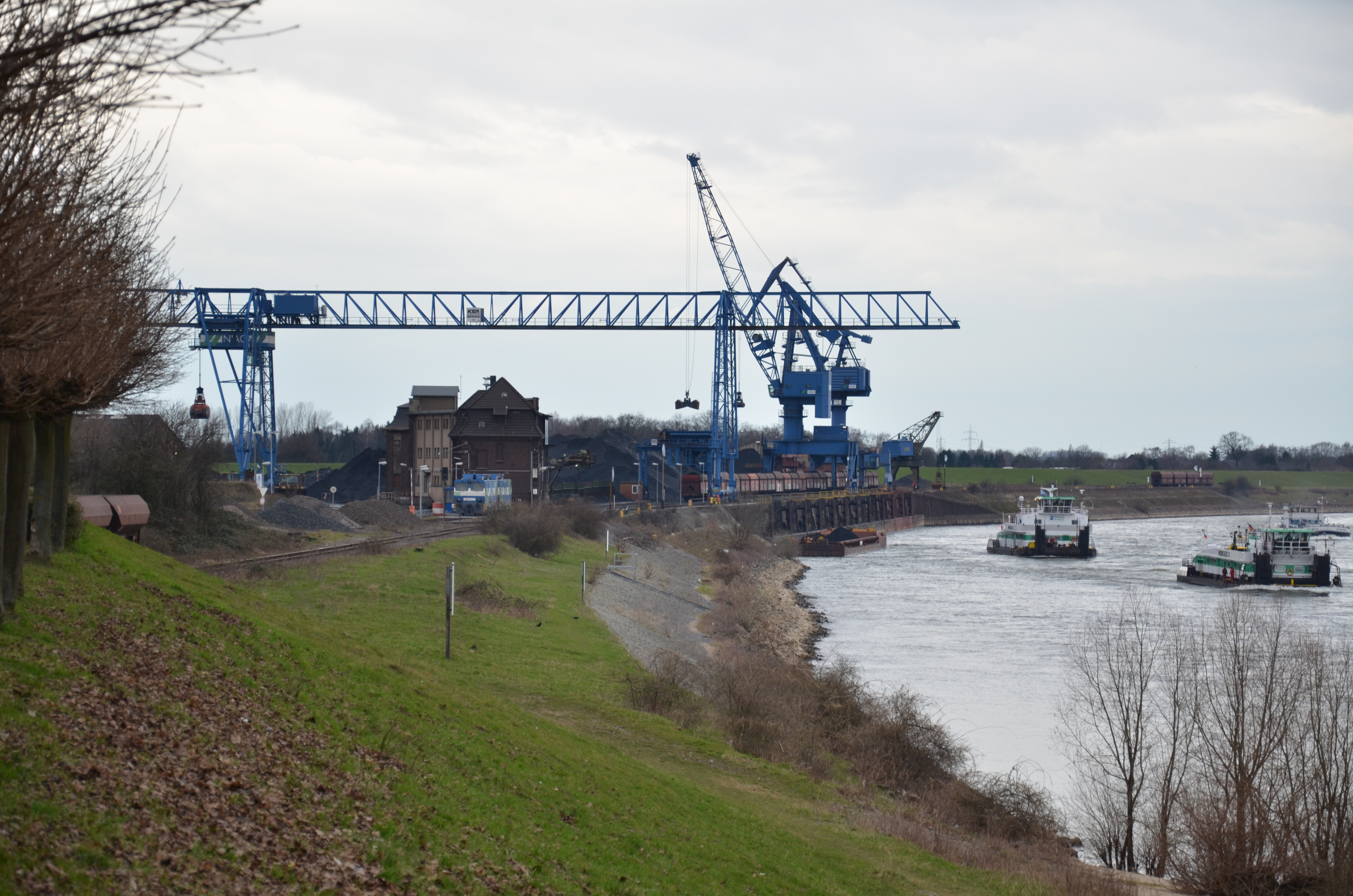 Parallelhafen am Rhein bei Orsoy vom Wallpromenadenring aus gesehen